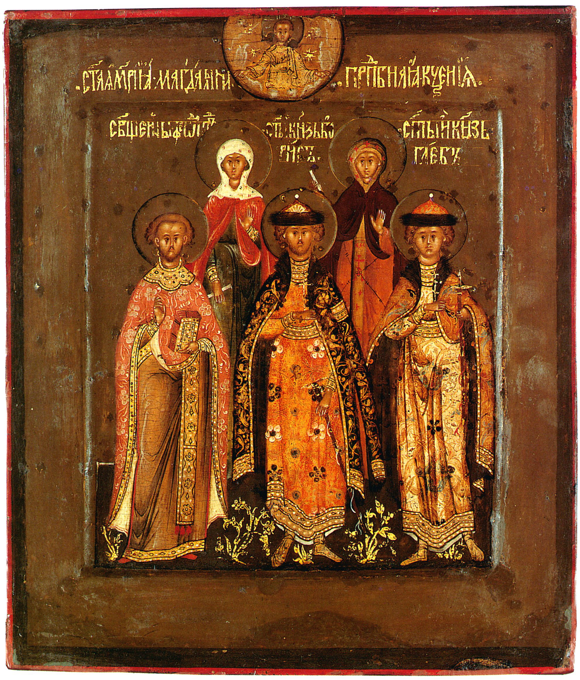 Семейная Икона Бориса Годунова: cвв. Феодот Киренейский, князь Борис, князь Глеб, прп. Ксения, Мария Магдалина